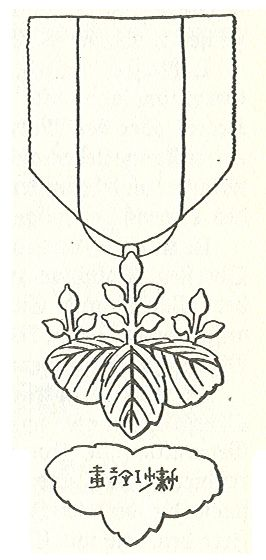 Scan van Blz. 189 van het boek "Handbuch der Ritter- und Verdienstorden " uitgegeven 1893 door Weber.Tekening van de in 1902 overleden Maximilian Gritzner. Robert Prummel 10 jul 2008 16:40 (CEST)